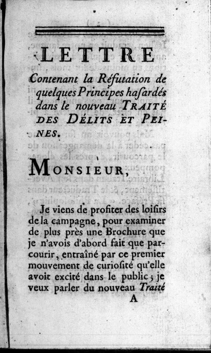 Pagina 1